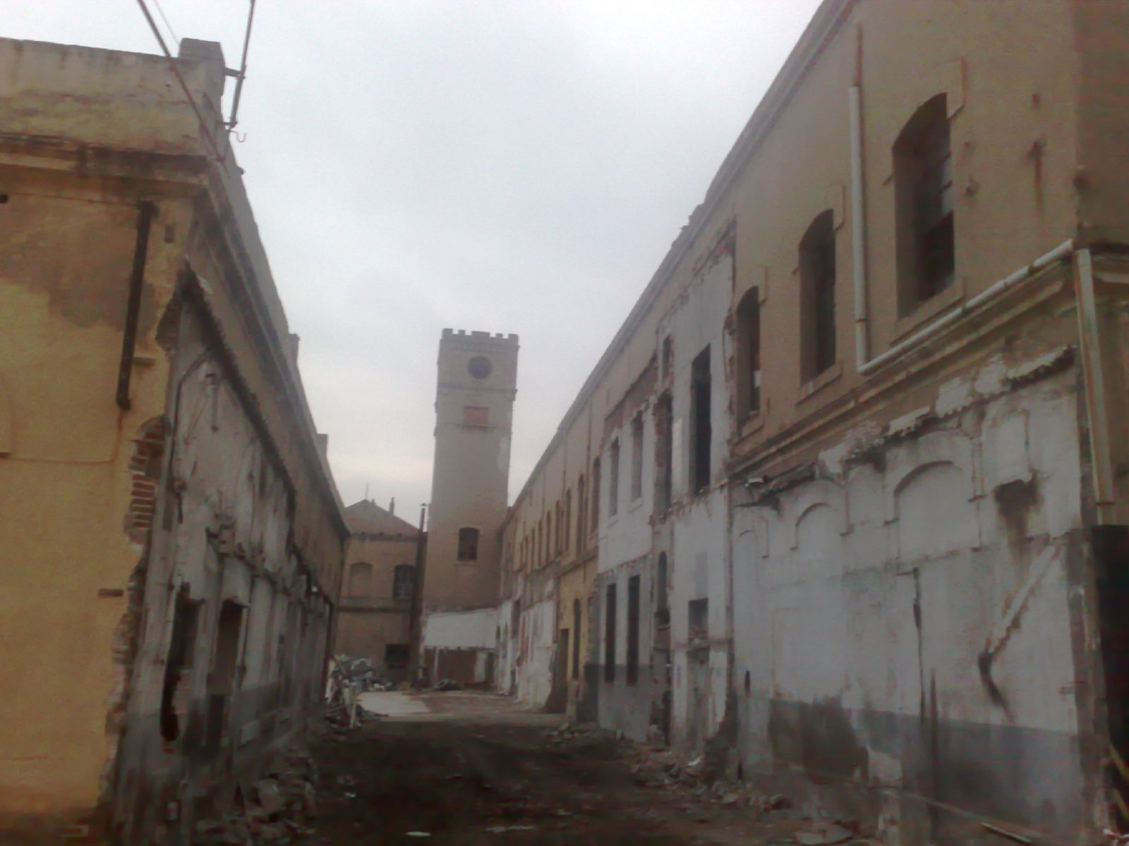 Hangar Barcelona